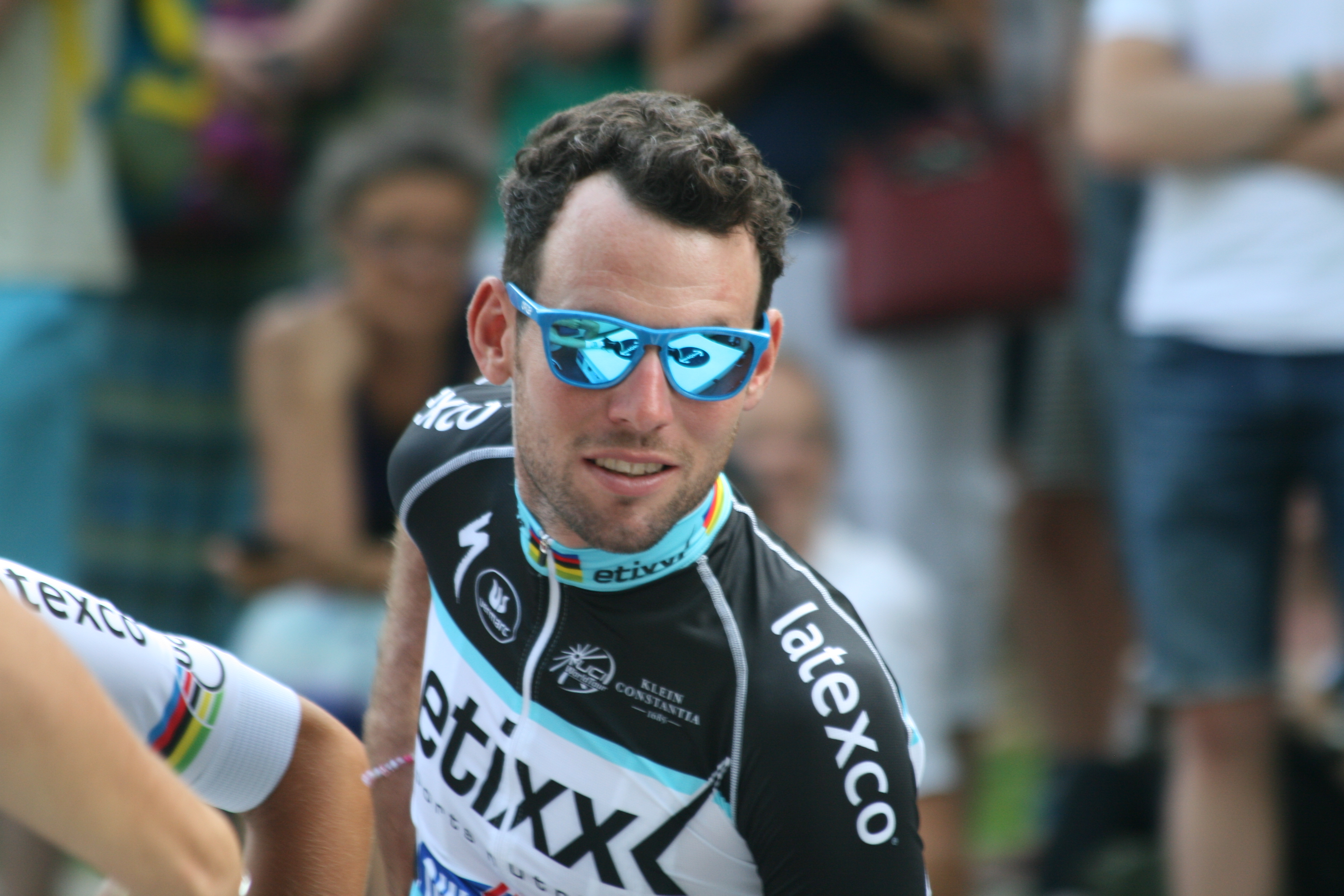 ploegenpresentatie Tour de France 2015 Utrecht